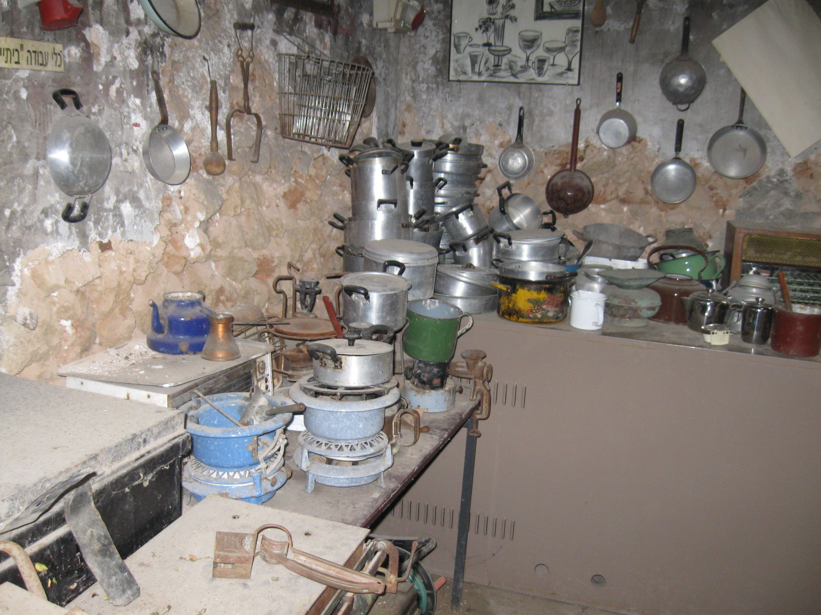 Mikveh_Israel_old__kitchenware רישיון נוצר על ידי משתמש:Daniel Ventura